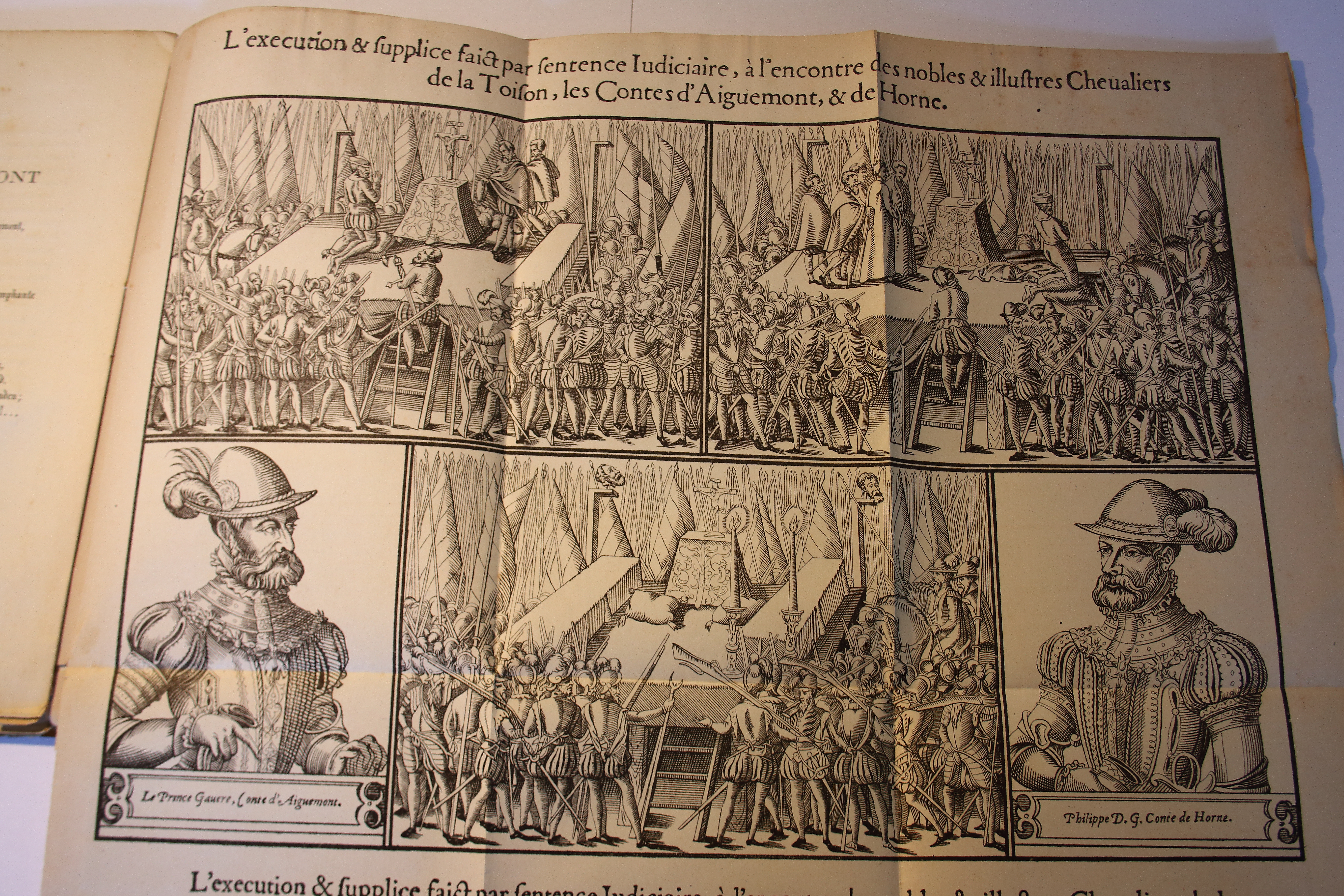 onthoofding van Egmont en Horne (Benoist Rigaud, Lyon, 1570), (in: 'Histoire du procès et de la mort du comte d'Egmont, décapité le 5 juin 1568, enseveli à Sotteghem', Eugène Van Damme, 1869)